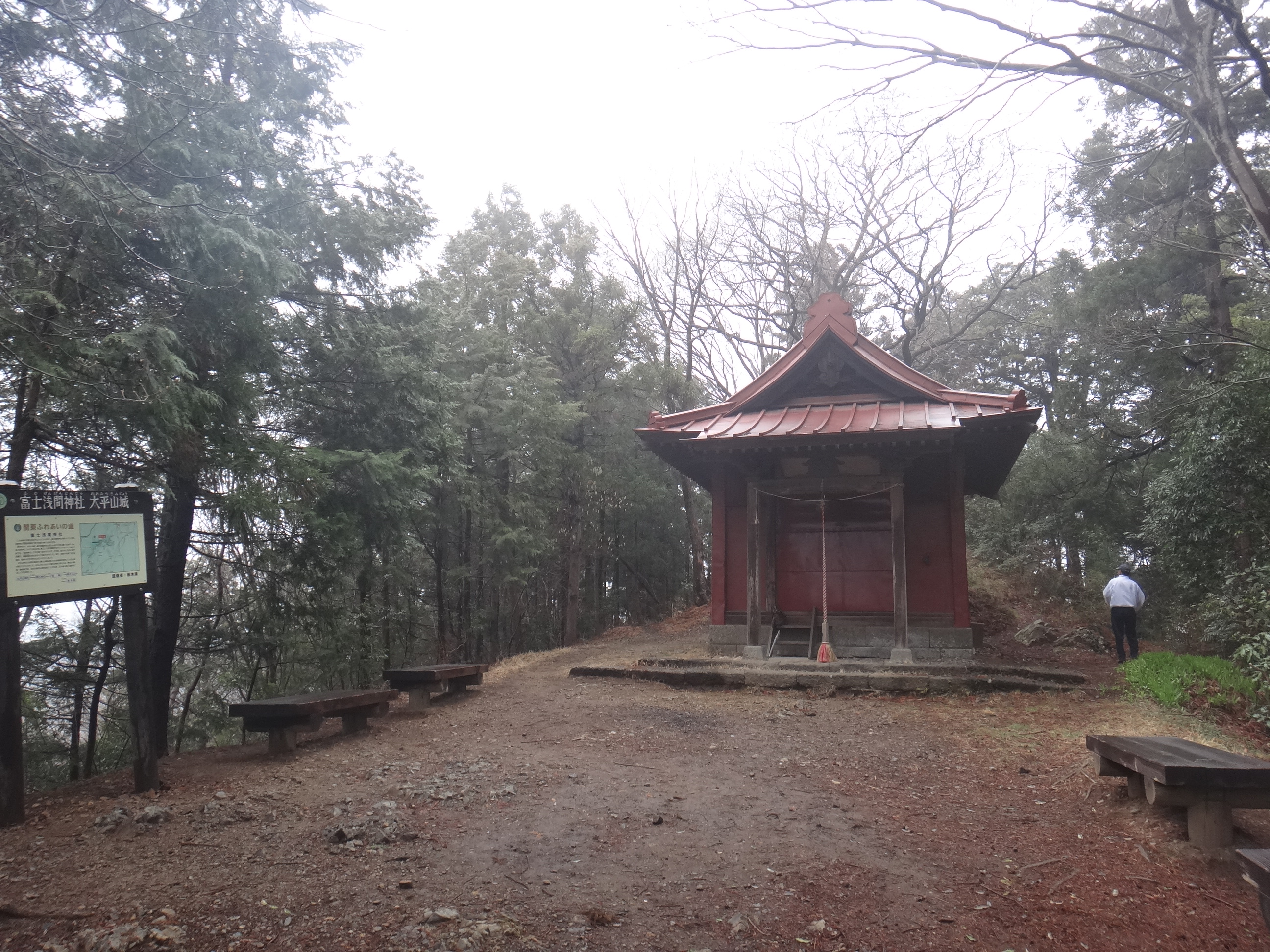 太平山 山頂の奥宮